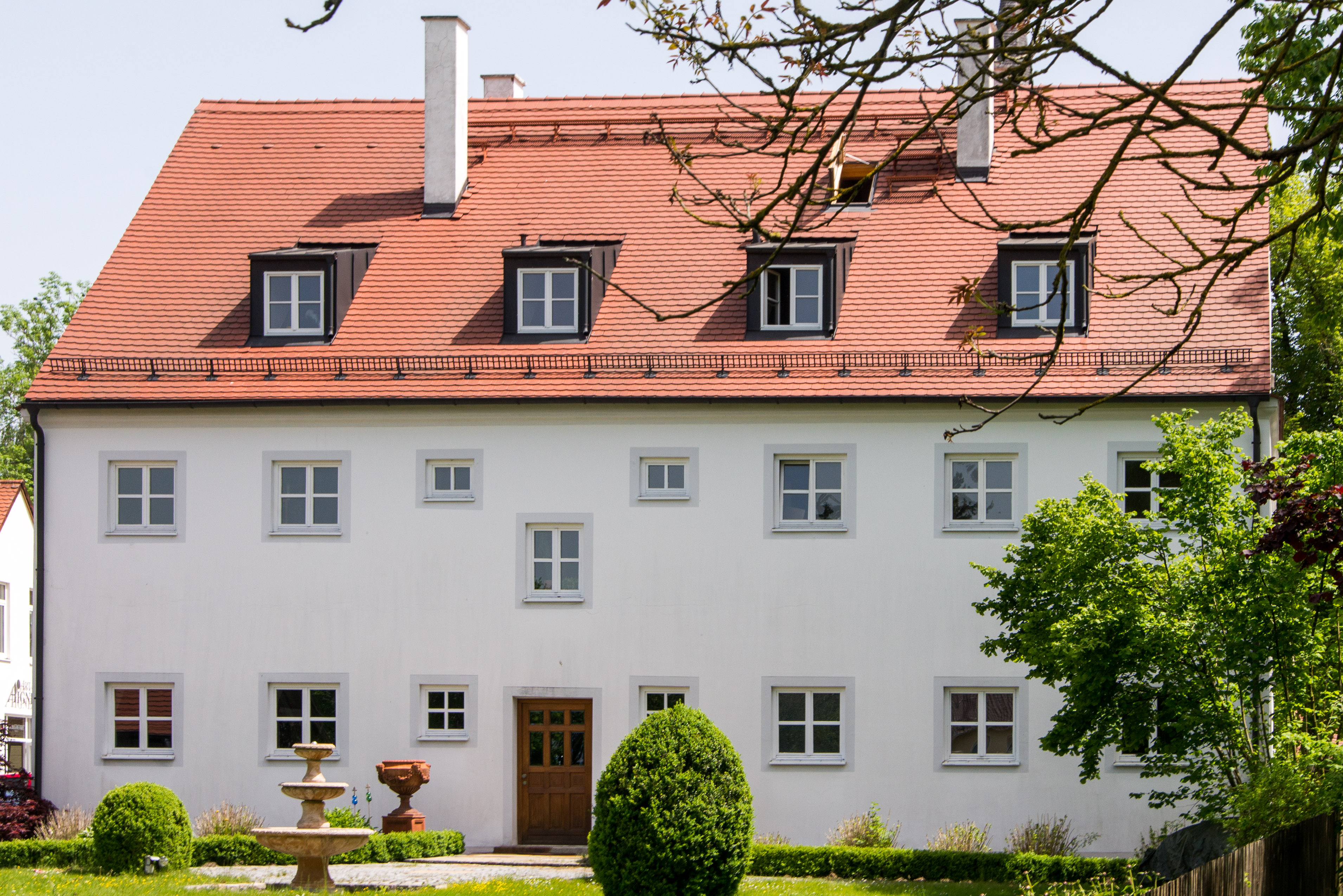 Wohnhaus: zum ehemaligen Schloss gehörig, zweigeschossiger Steilsatteldachbau mit abgesetztem, leicht vorkragendem Giebel, gewölbte Erdgeschossräume, 17/18. Jahrhundert This is a photograph of an architectural monument.